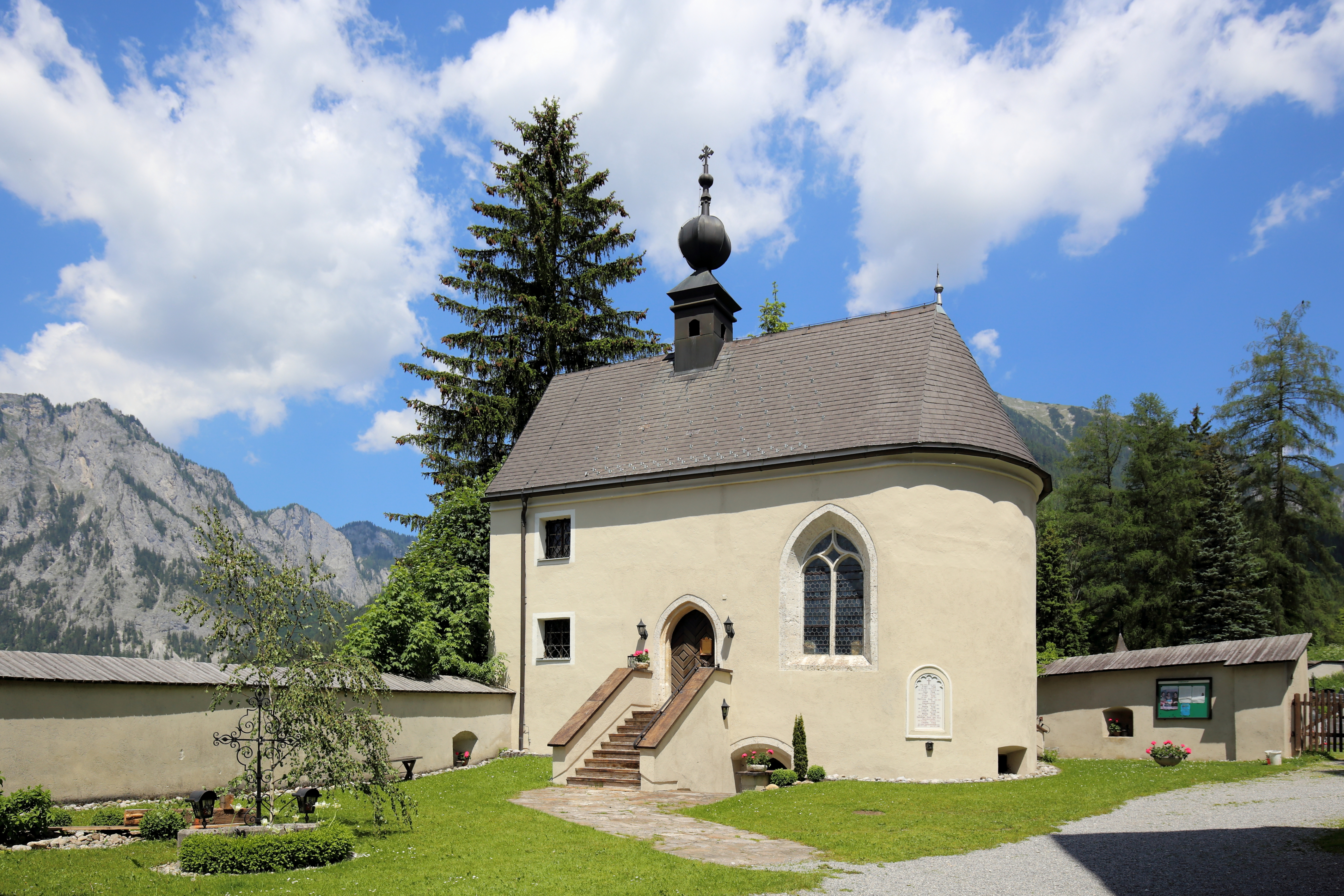 Südansicht der Antoniuskapelle in Oberort, ein Ortsteil der österreichischen Gemeinde Tragöß-Sankt Katharein im steirischen Bezirk Bruck-Mürzzuschlag. Ein spätgotischer Bau, datiert 1518 und 1524, der auf den Grundmauern eines romanischen Karners errichtet wurde. Ende das 17. Jahrhunderts wurde die Kapelle um ein Joch Richtung Kirchhofmauer erweitert.